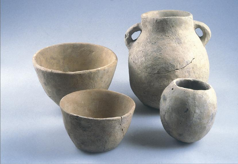 The Yarmukian Culture is a Neolithic culture of the ancient Levant. It was the first culture in Prehistoric Israel and one of the oldest in the Levant to make use of pottery. The Yarmukian derives its name from the Yarmouk River which flows near its type site at Sha'ar HaGolan, a kibbutz at the foot of the Golan Heights. The pictures are fromYosef Garfinkel excavations taken between 1989-1990 & 1998-2004 התרבות הירמוכית היא תרבות מהתקופה הניאוליתית הקרמית שמרבית שרידיה נתגלו באיזור שדות שער הגולן, והיא קיבלה את שמה על שם נהר הירמוך הזורם בסמוך. התמונת הן מחפירות שנערכו בשער הגולן על ידי הארכאולוגי יוסי גרפינקל מהאוניברסיטה העברית . נערכו 2 עונות חפירה 1990-1989, ו 1996-2004. קערות וקנקנים מקרמיקה